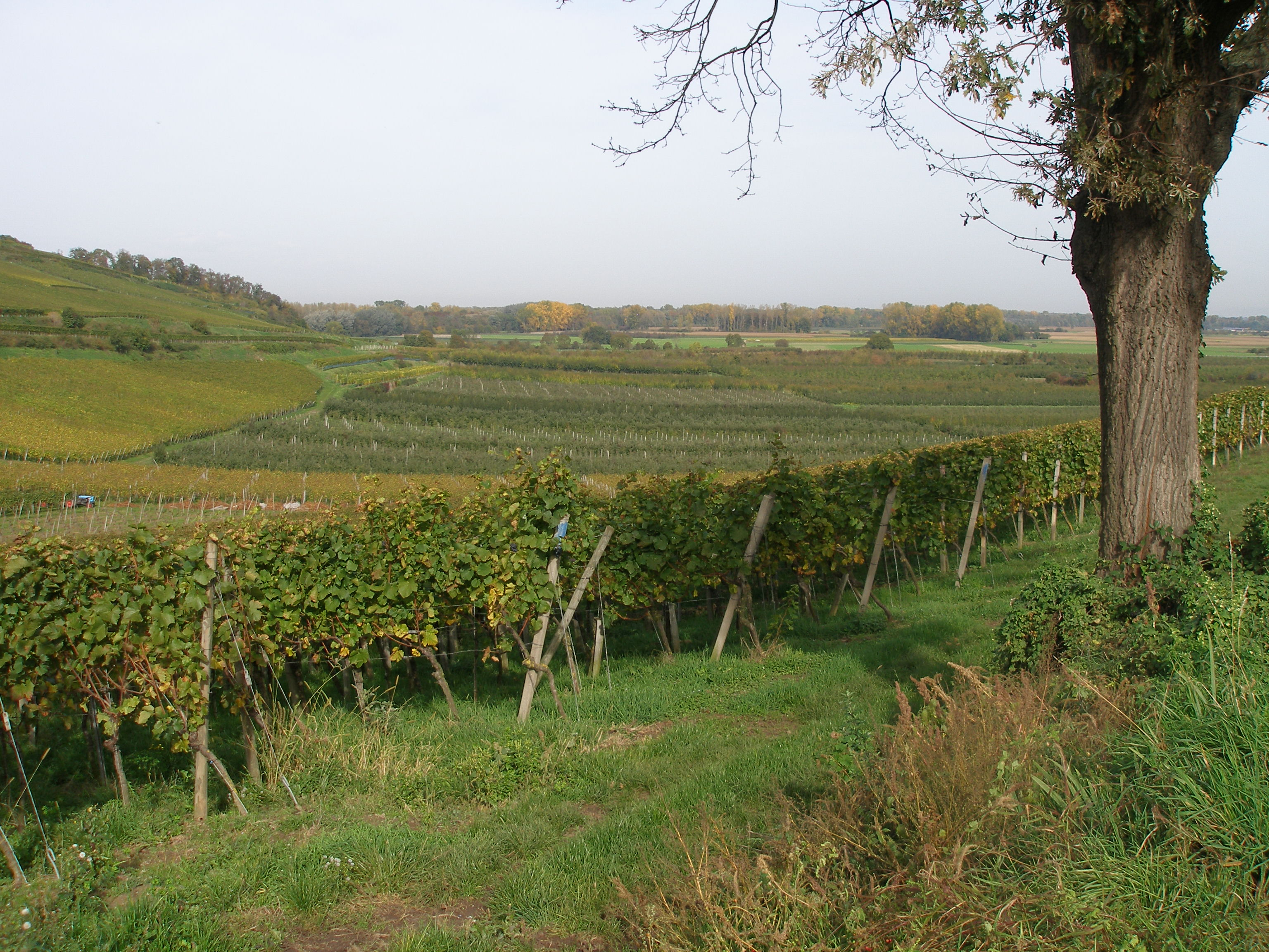 Weingärten Sasbach am Kaiserstuhl